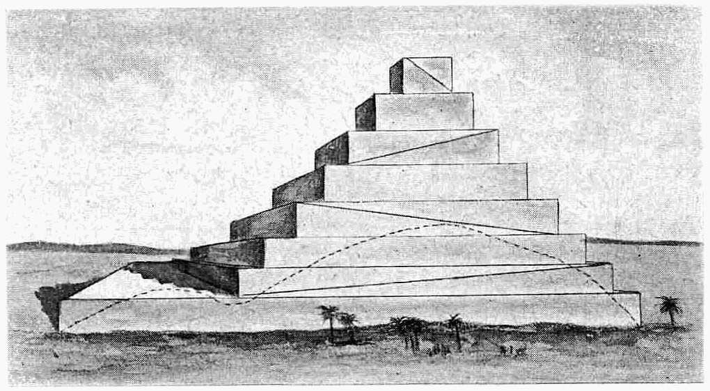 reconstitution de la tour de babel